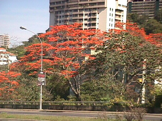 Bucare (Erythrina poeppigiana) en Quebrada La Boyera